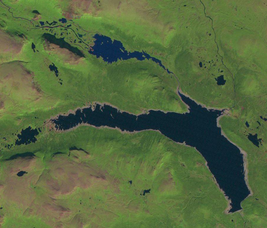 Photo Landsat du 3 septembre 1994 du grand lac Tjakjajaure et des méandres de la Rapaätno.